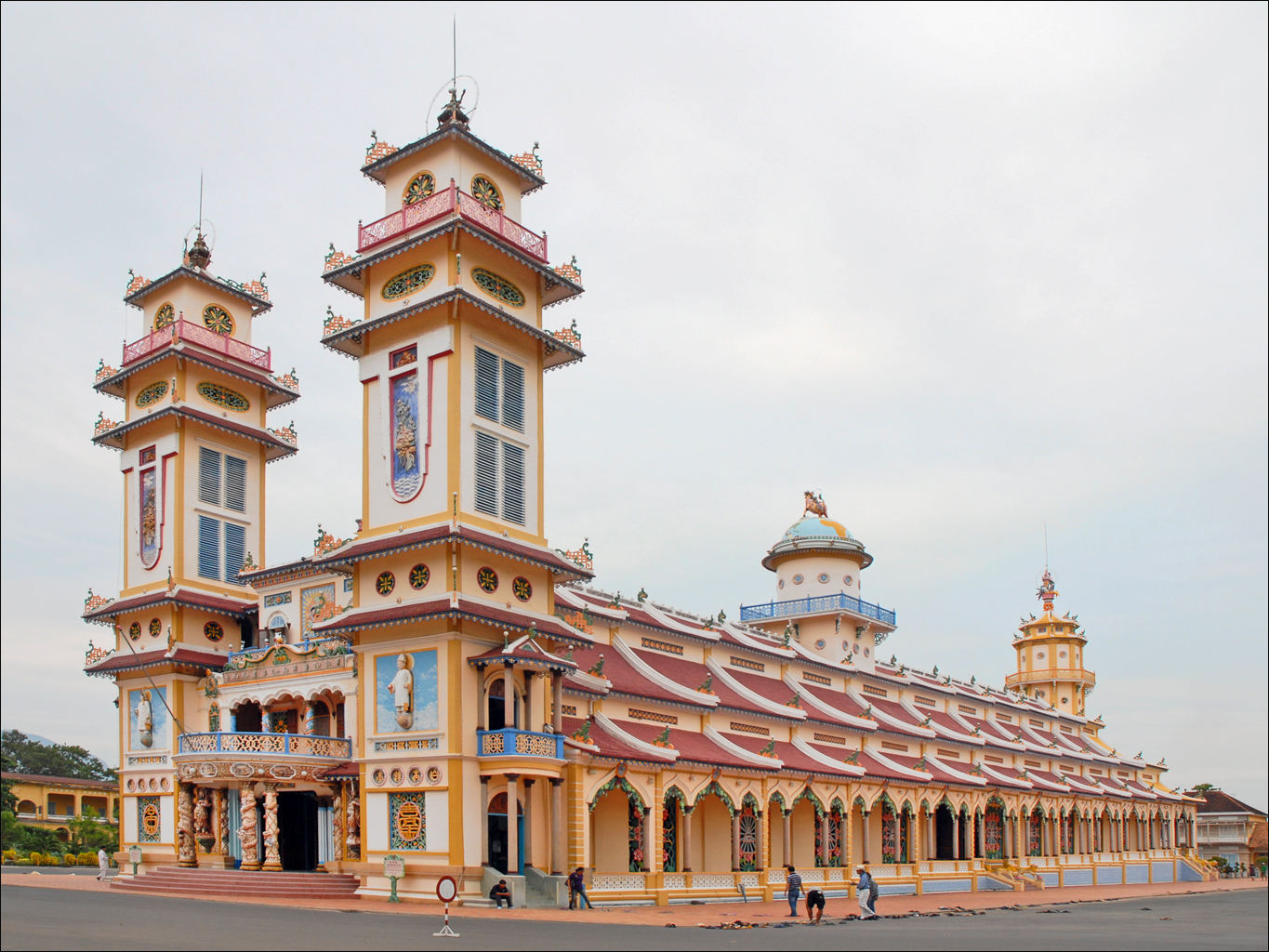 Le grand temple de la Sainte Mère à Tay Ninh, au Vietnam Le Cao Daï (Palais Suprême) est une religion, fondée en 1926 et reconnue officiellement au Vietnam dont le Saint Siège est à Tay Ninh à une centaine de kilomètres d'Ho Chi Minh Ville (ancienne Saïgon) Le grand temple, appelé Thanh That Cao Dai, a été construit entre 1933 et 1955, sans plan préalable et selon les visions du fondateur de cette religion : Ngô Van Chieu. Il est au centre d'un domaine très étendu comprenant également une école, un orphelinat, des résidences pour les religieux, un jardin, un hôpital, etc. Son architecture très colorée opère une fusion entre l'Occident et l'Orient. Les tours en façade évoquent les églises chrétiennes, la tour centrale évoque un minaret et la tour à l'arrière, au dessus de l'autel, évoque une pagode. L'oeil divin figure sur la façade mais également sur les fenêtres du bas. Il symbolise à la fois l'esprit de Dieu et la lumière du coeur. «L'œil est le principe du cœur, d'où vient la source de lumière. Cette lumière est esprit et l'esprit lui-même est Dieu ». Sur les tours de la façade, figurent deux personnages en relief. A gauche : Lam Huong Thanh, la première femme devenue cardinale, à droite : Le Van Trung, le premier Pape caodaïste. Le grand temple est construit sur 9 niveaux symbolisant les 9 marches menant au Paradis. site officiel